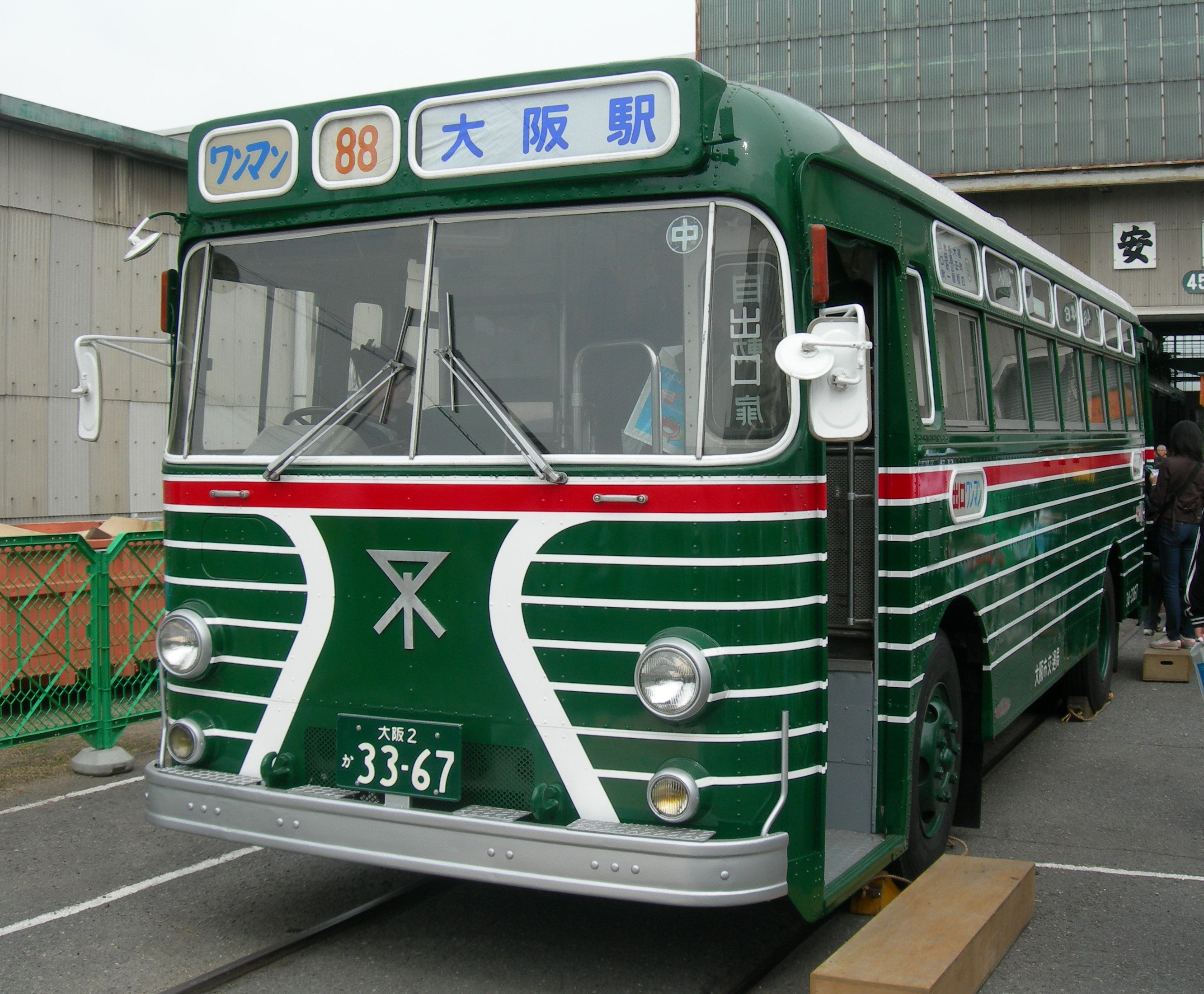 大阪市営バス 「ゼブラバス(日野BT11型) 」